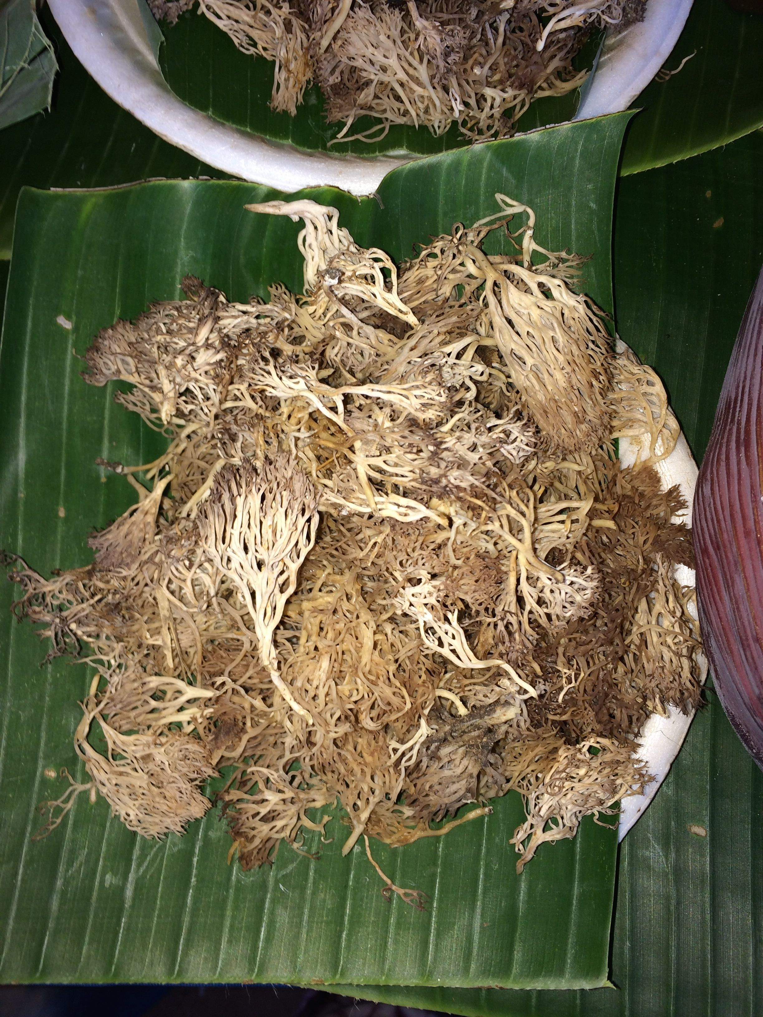 Hericium Erinaceus ou barbe de satyre, est un comestible de choix lorsqu'il est jeune, et la texture des champignons sautés est souvent comparée aux fruits de mer. Il apparaît souvent dans la cuisine végétarienne chinoise pour remplacer la viande de porc ou de l'agneau. Ce champignon est cultivé commercialement sur ​​des rondins ou de la sciure stérilisée. Il est disponible frais ou séchés dans les épiceries asiatiques. image de sakon nakhon thailande